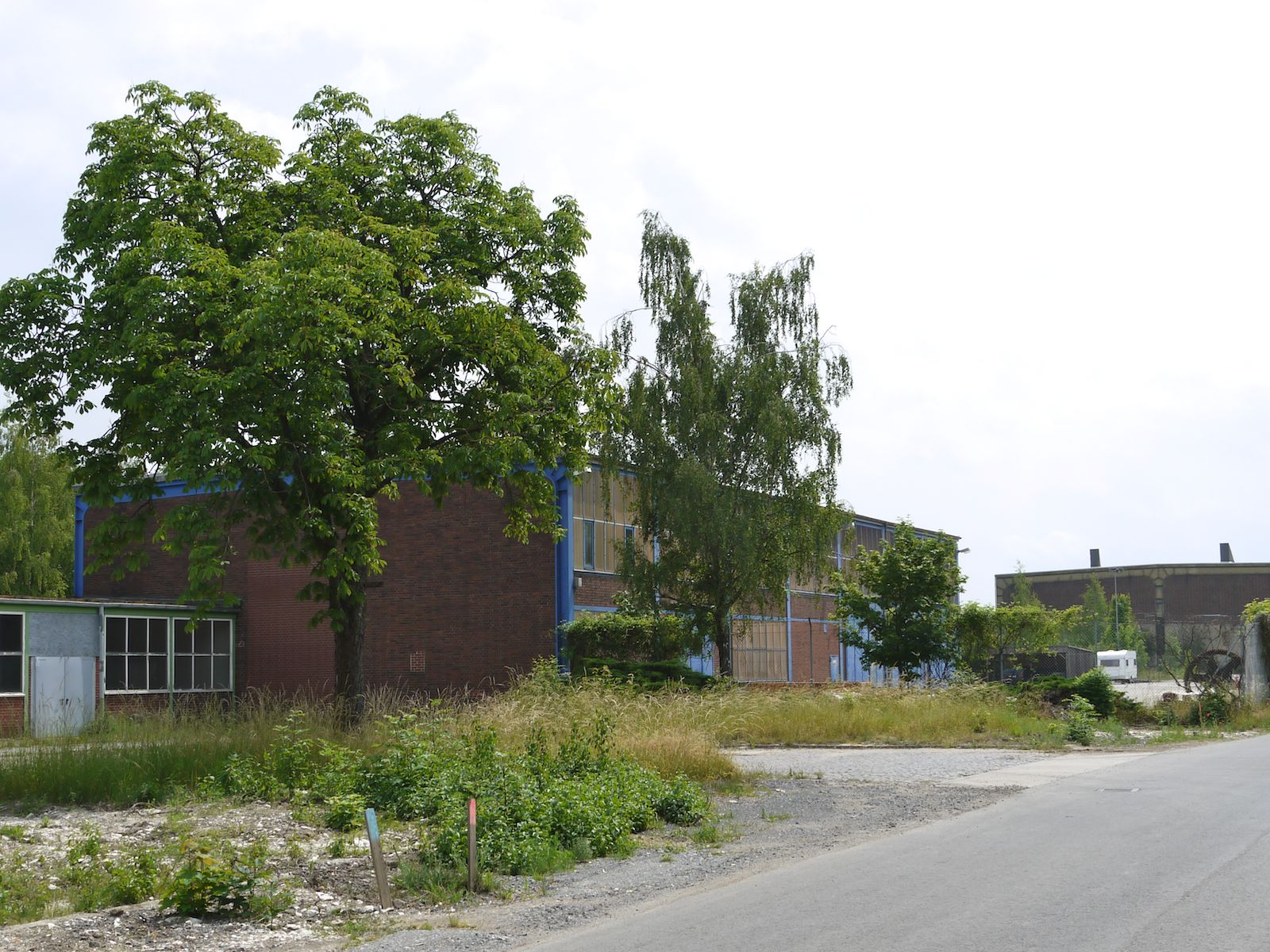 Schachtanlage Hannoversche Treue 2 - Blick von den Werkstätten auf das ehemalige Fördermaschinenhaus. Zwischen den Gebäuden war der Schacht mit dem Fördergerüst.